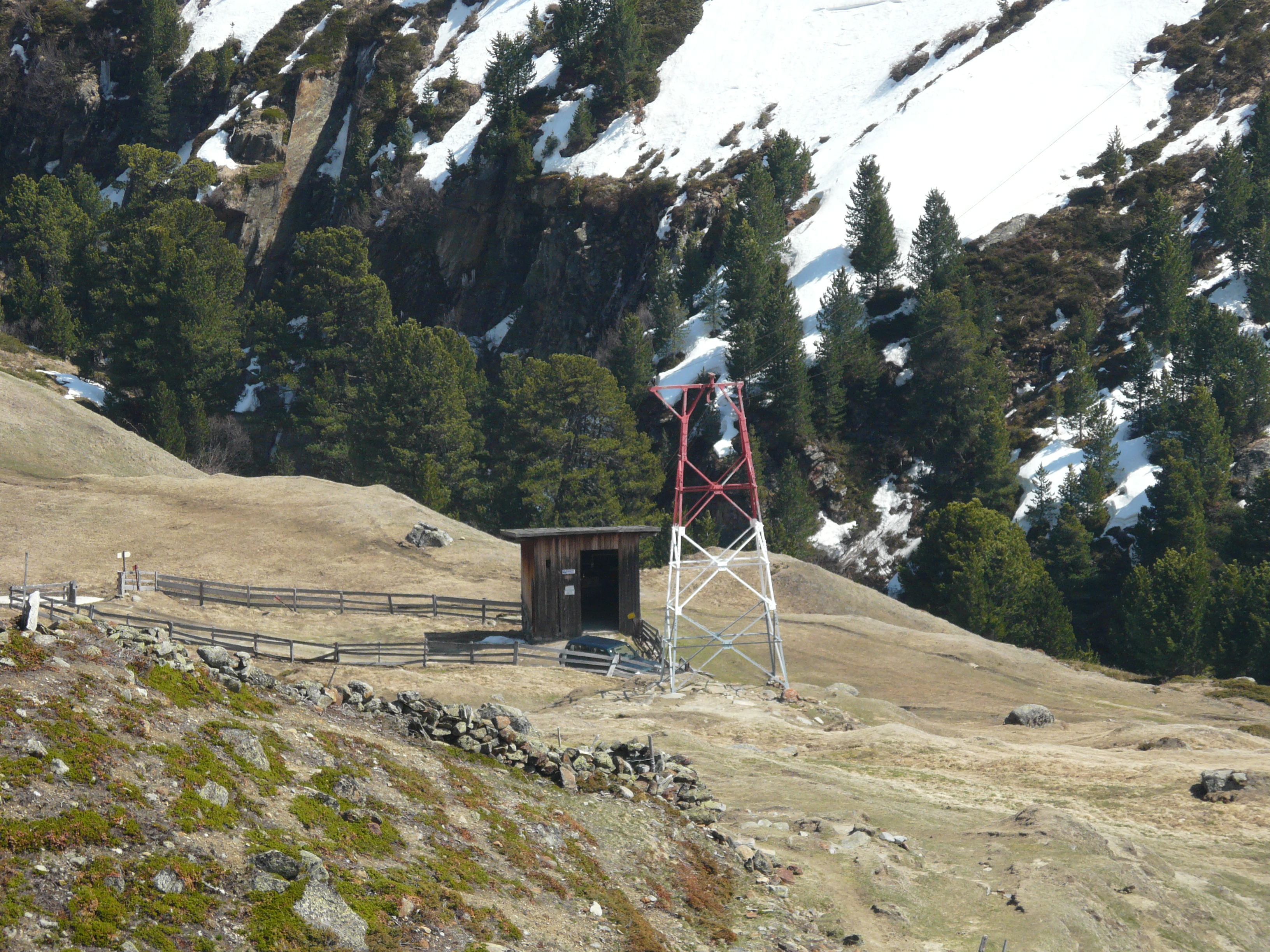 Die Talstation der zur Versorgung der Vernagthütte dienenden Materialseilbahn